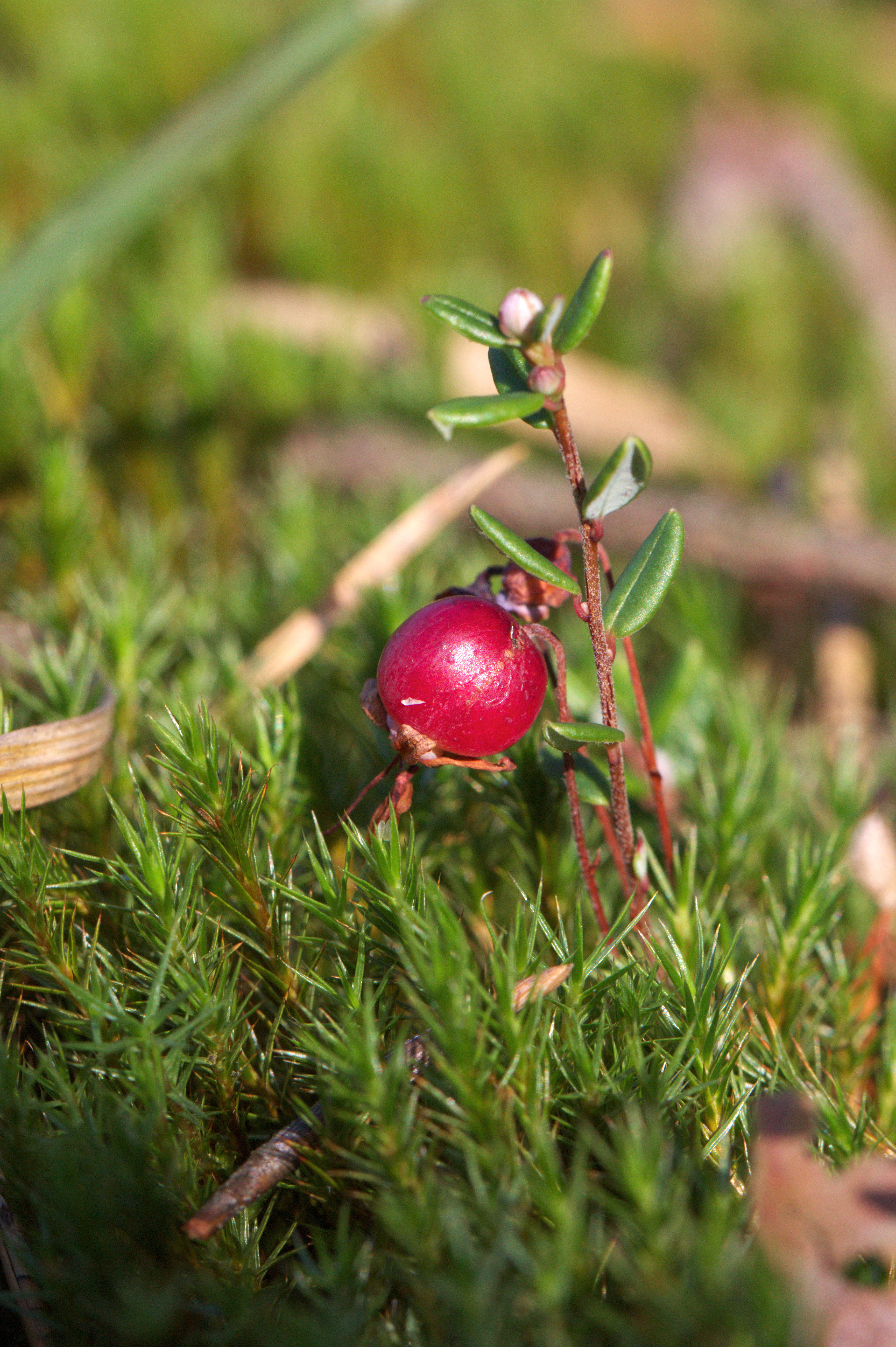 Žemlička - (přírodní památka) - Oxycoccus palustris Pers., klikva bahenní - status ohrožení v ČR: C3 (ohrožený)